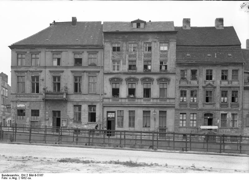 Berlin, Fassade Häuser Friedrichsgracht 15-17 Berlin, Friedrichsgracht 15-17 [Berlin.- Fassade Häuser Friedrichsgracht 15-17]